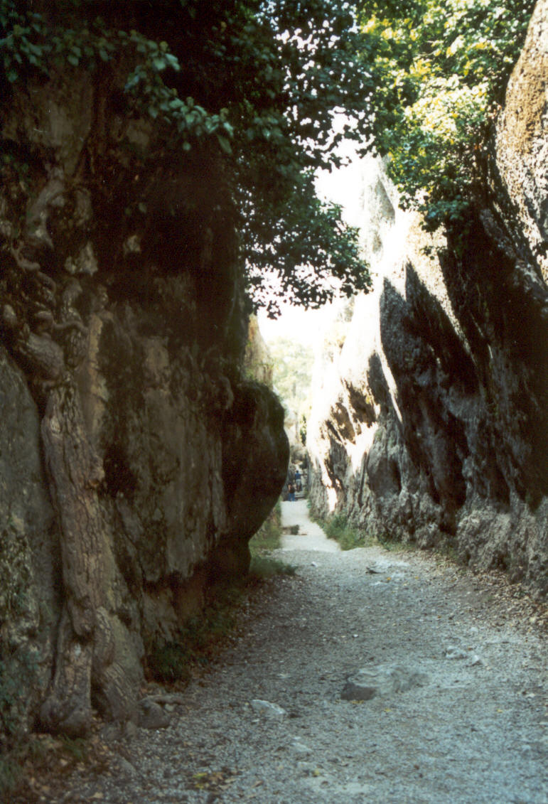 Desfiladero con cauce seco formado por un riachuelo que abandonó el cauce original. Ciudad Encantada, Cuenca. Autor: Fev. Año 2002 (octubre).